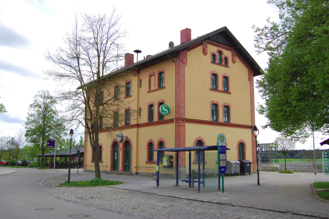 Bahnhof Deisenhofen, 13 km from M?en, Deutschland (Zone 32).